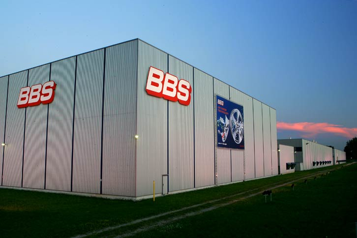 BBS Kraftfahrzeugtechnik Herbolzheim